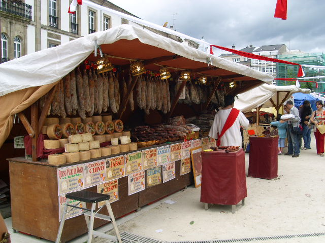 Posto con productos típicos (Praza Maior), Arde Lucus 2009